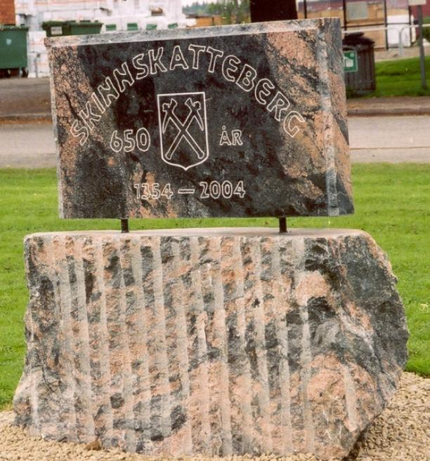 Skinnskatteberg 650 år. Copyfree, egen bild.